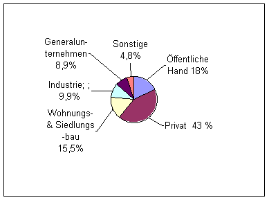 Auftragsstruktur des Garten- Landschaftsbaus 2003